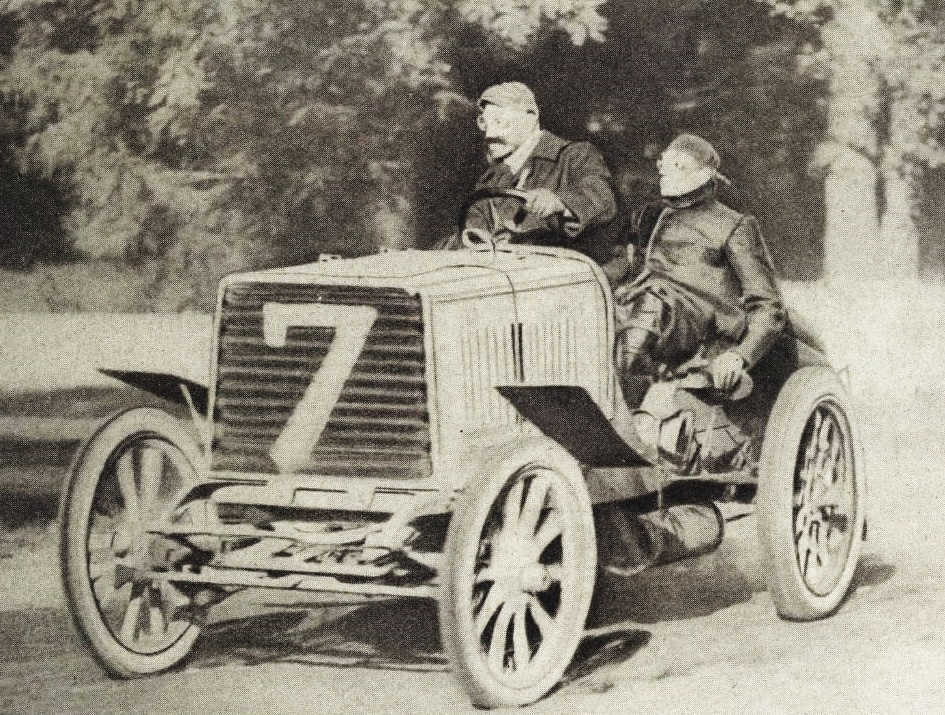 George Heath, vainqueur de la première Coupe Vanderbilt 1904 sur Panhard, au circuit de Manhattan (La Vie au Grand Air du 27 octobre 1904)